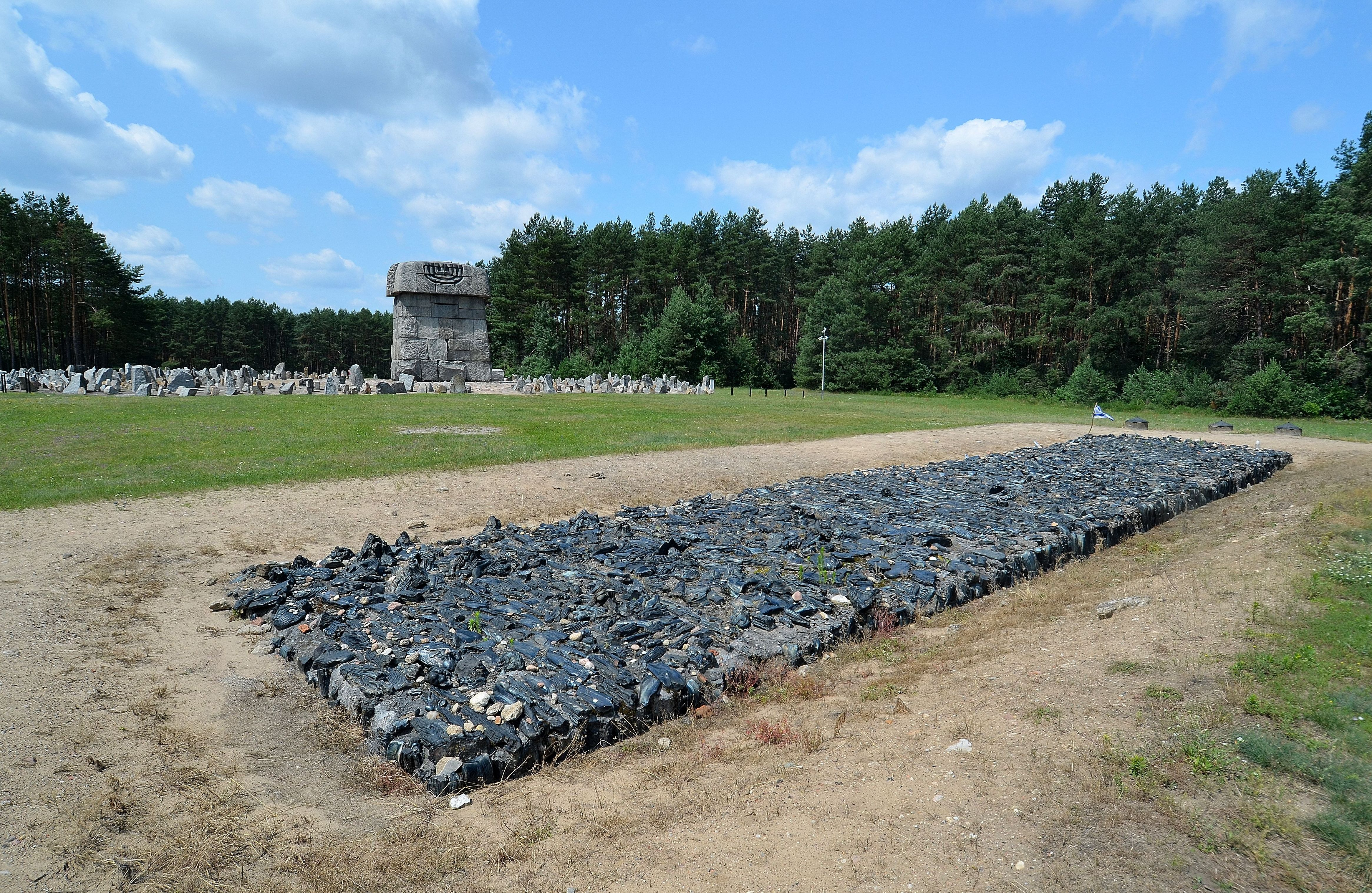 Pomnik-mauzoleum na terenie obozu zagłady Treblinka II